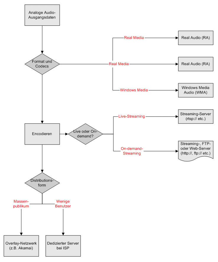 Schematischer Ablauf einer Streaming-Produktion (Flowchart)